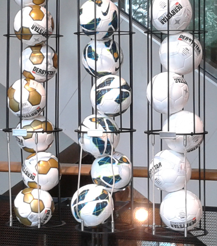 Bälle im Sportgeschäft Engelhorn sports in Mannheim, dabei Nike, Derbystar